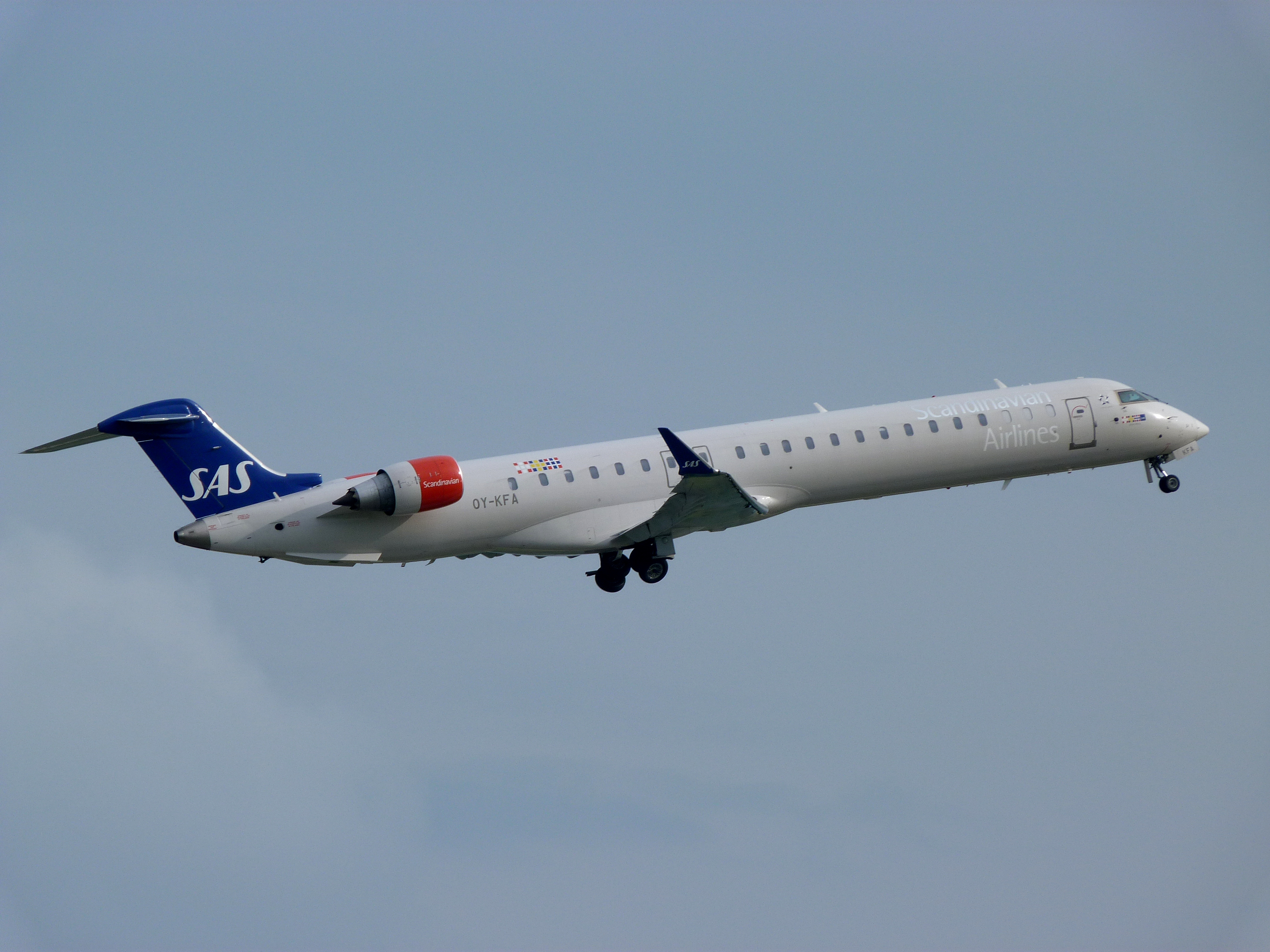 OY-KFA CRJ-900 SAS